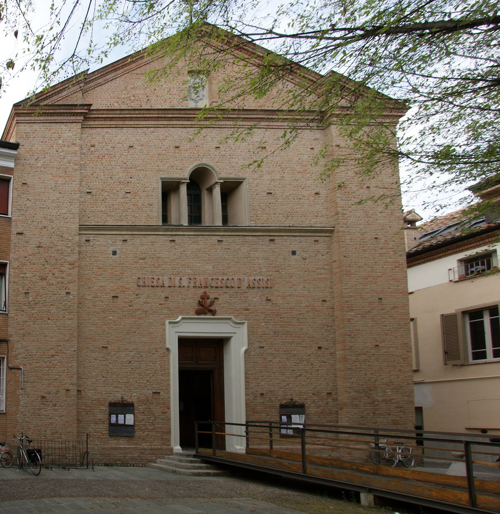 La Chiesa di San Francesco